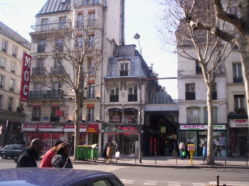 Croisement du Boulevard de Strasbourg et du passage Brady, Paris 10e arrondissement.